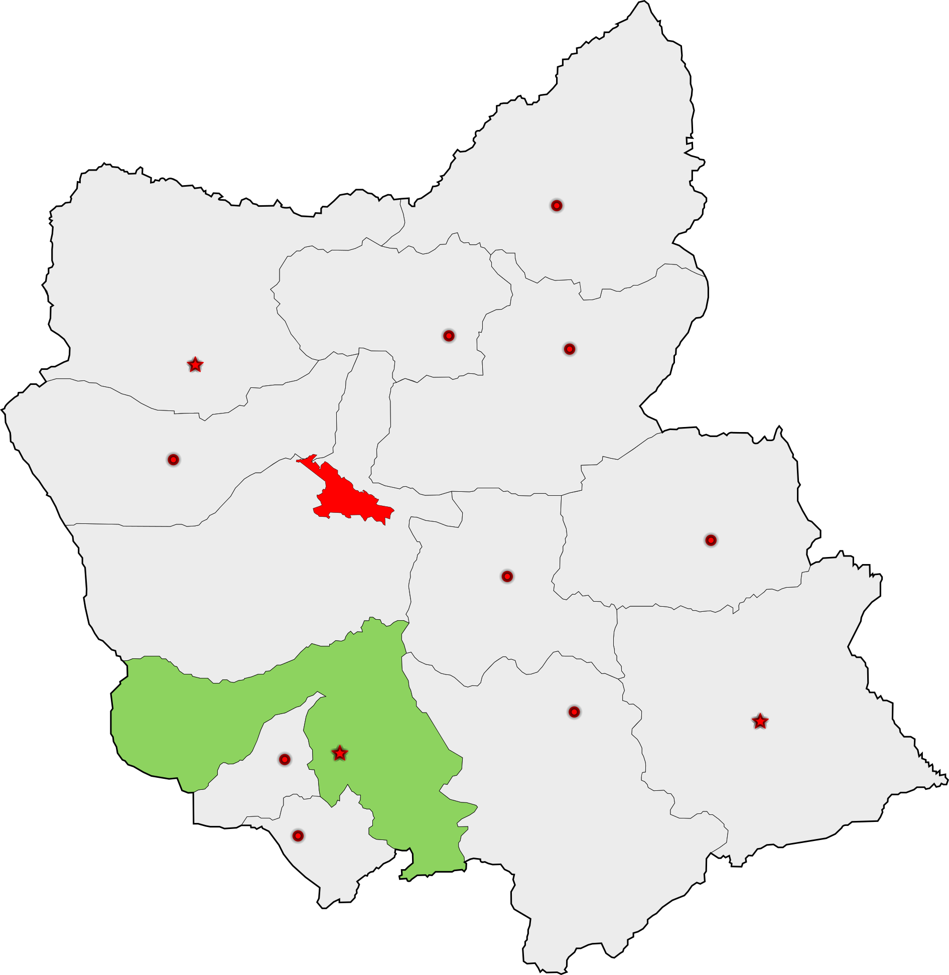 حوزهٔ انتخاباتی مراغه و عجب‌شیر برای انتخابات مجلس شورای اسلامی